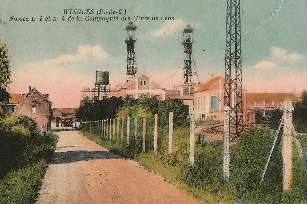 La Fosse n° 3 - 4 de la Compagnie des mines de Meurchin était un charbonnage constitué de deux puits situé à Wingles, Pas-de-Calais, Nord-Pas-de-Calais, France.